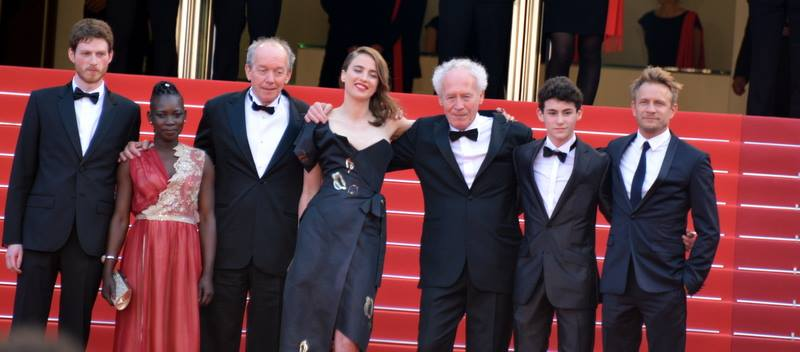 Présentation du film "La fille inconnue" au festival de Cannes